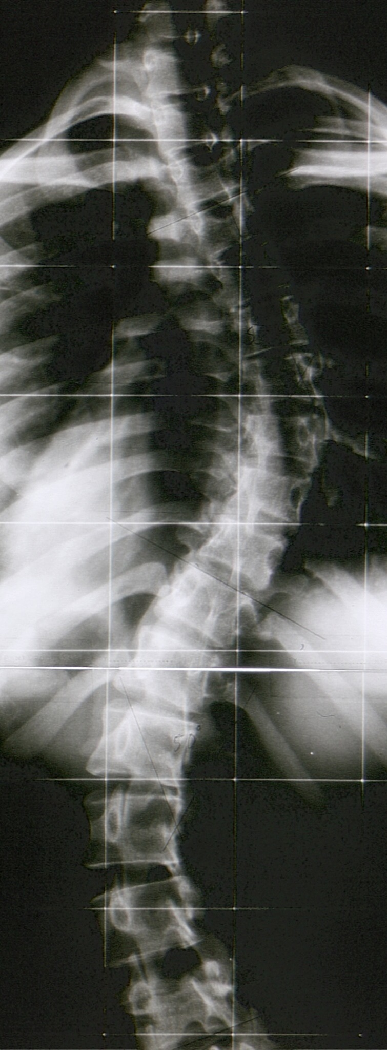 Skoliose der Brustwirbelsäule